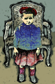 Fernando Pessoa, a Portuguese poet, drawed.